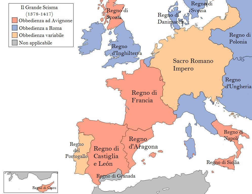 Grande scisma